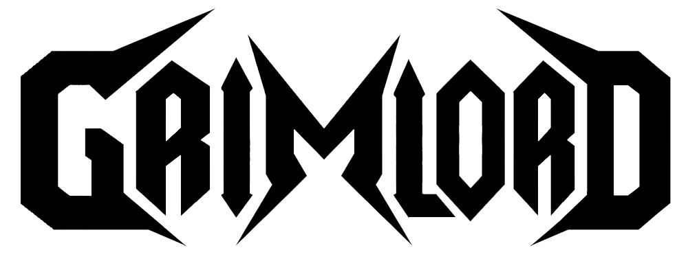 Logo zespołu Grimlord - Źródło